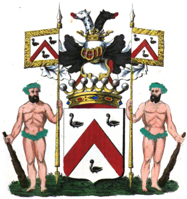 Armoiries de la famille van der Gracht de Fretin